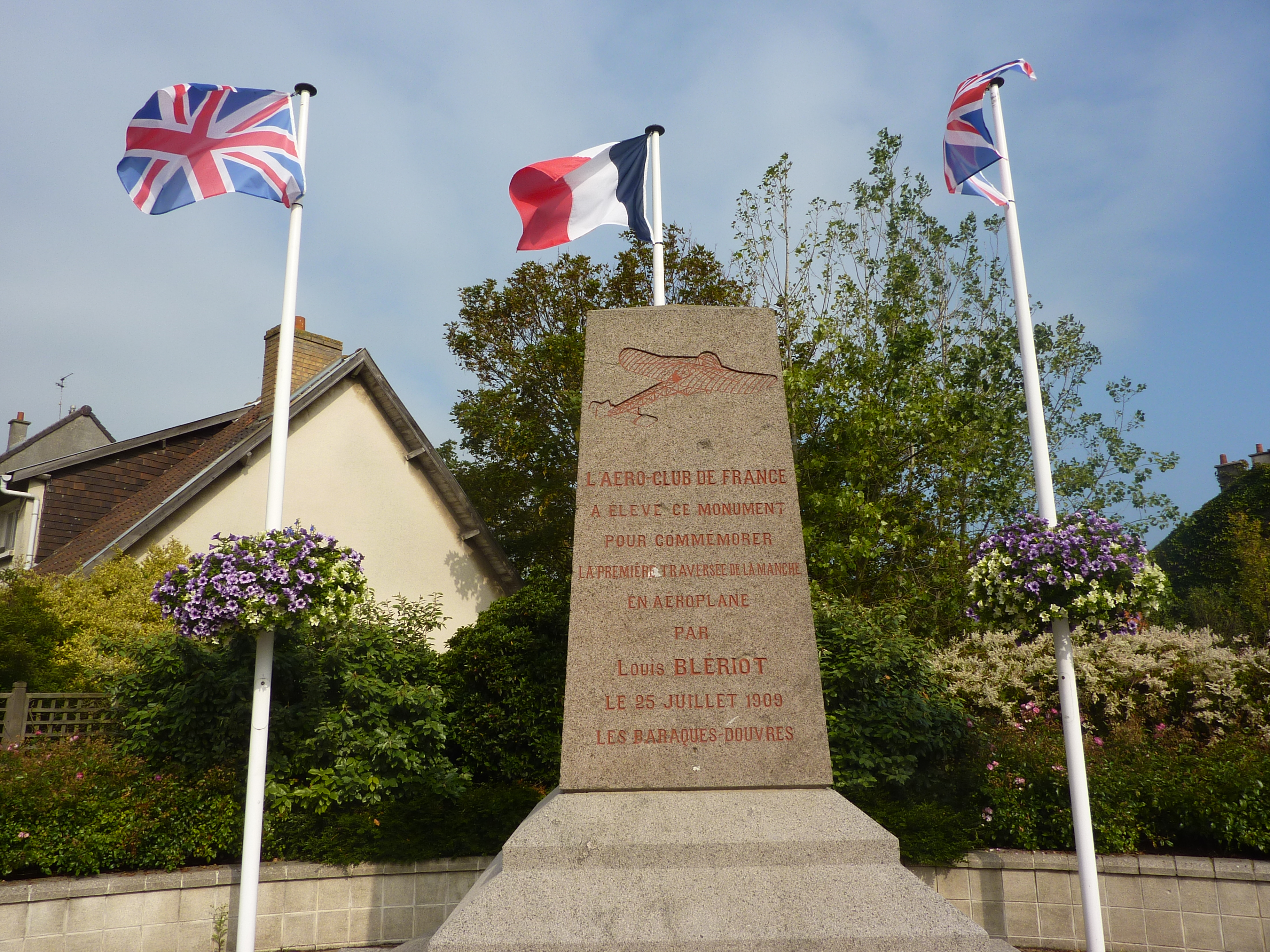 Monument Louis Blériot inauguré le 15 juillet 1911 au hameau Les Baraques, qui a pris en 1936 le nom de l'aviateur parti d'ici pour la première traversée de la Manche en avion et s'appelle aujourd'hui Sangatte-Blériot Plage, Pas-de-Calais, France.